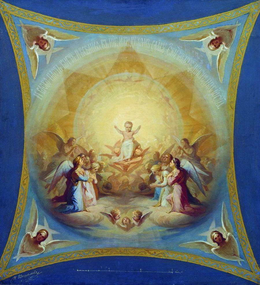 Эскиз